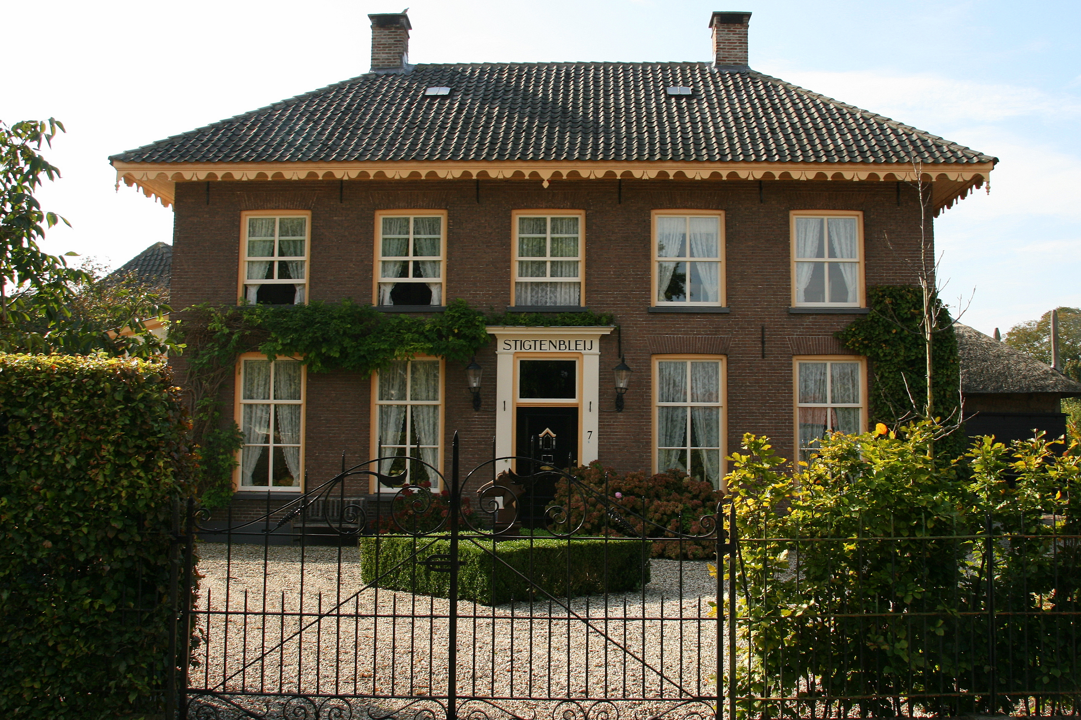 "Stigtenbleij". Deftig herenhuis, gedateerd in stichtingssteen 1865. Bewerkte daklijst. De bescherming betreft slechts het hoofdgebouw (woonhuis met aangebouwde bedrijfsbebouwing).